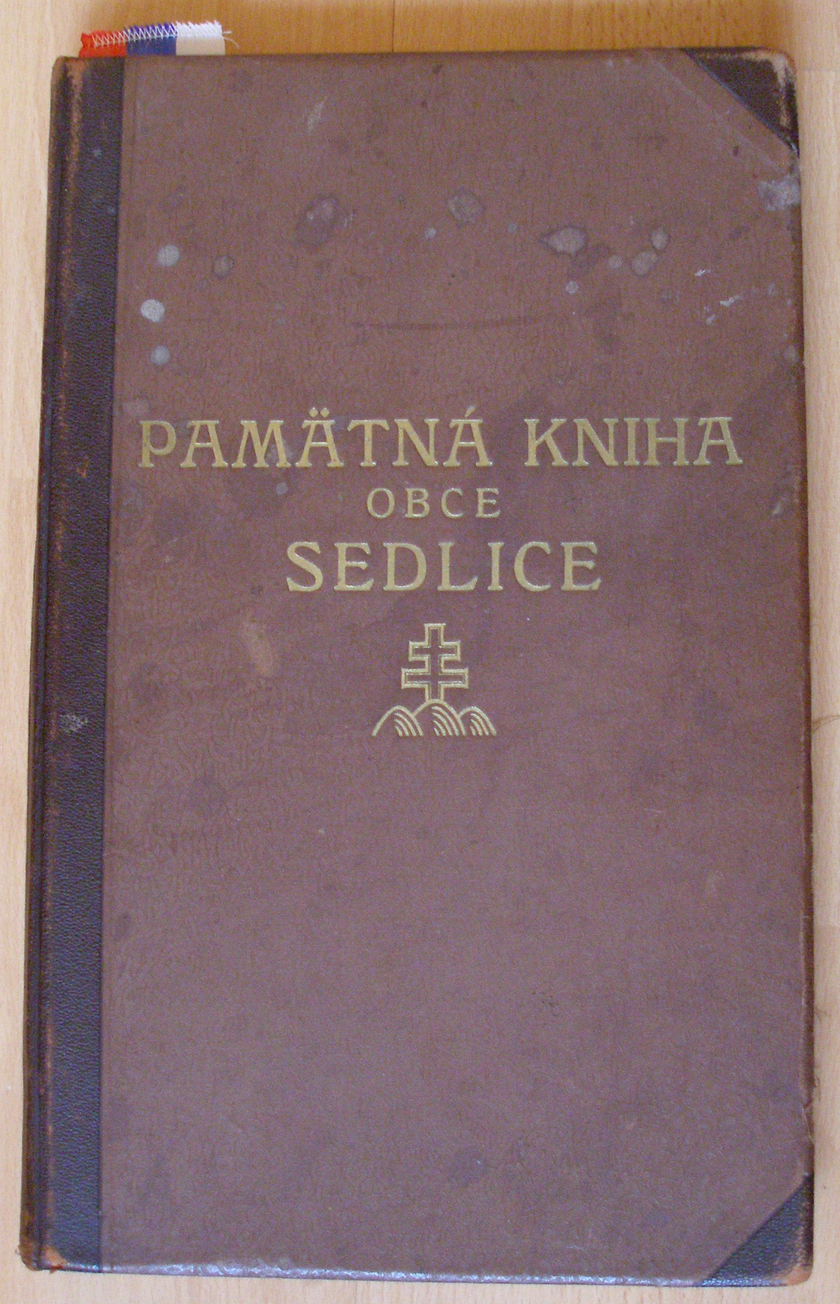 Kronika obce Sedlice z roku 1933